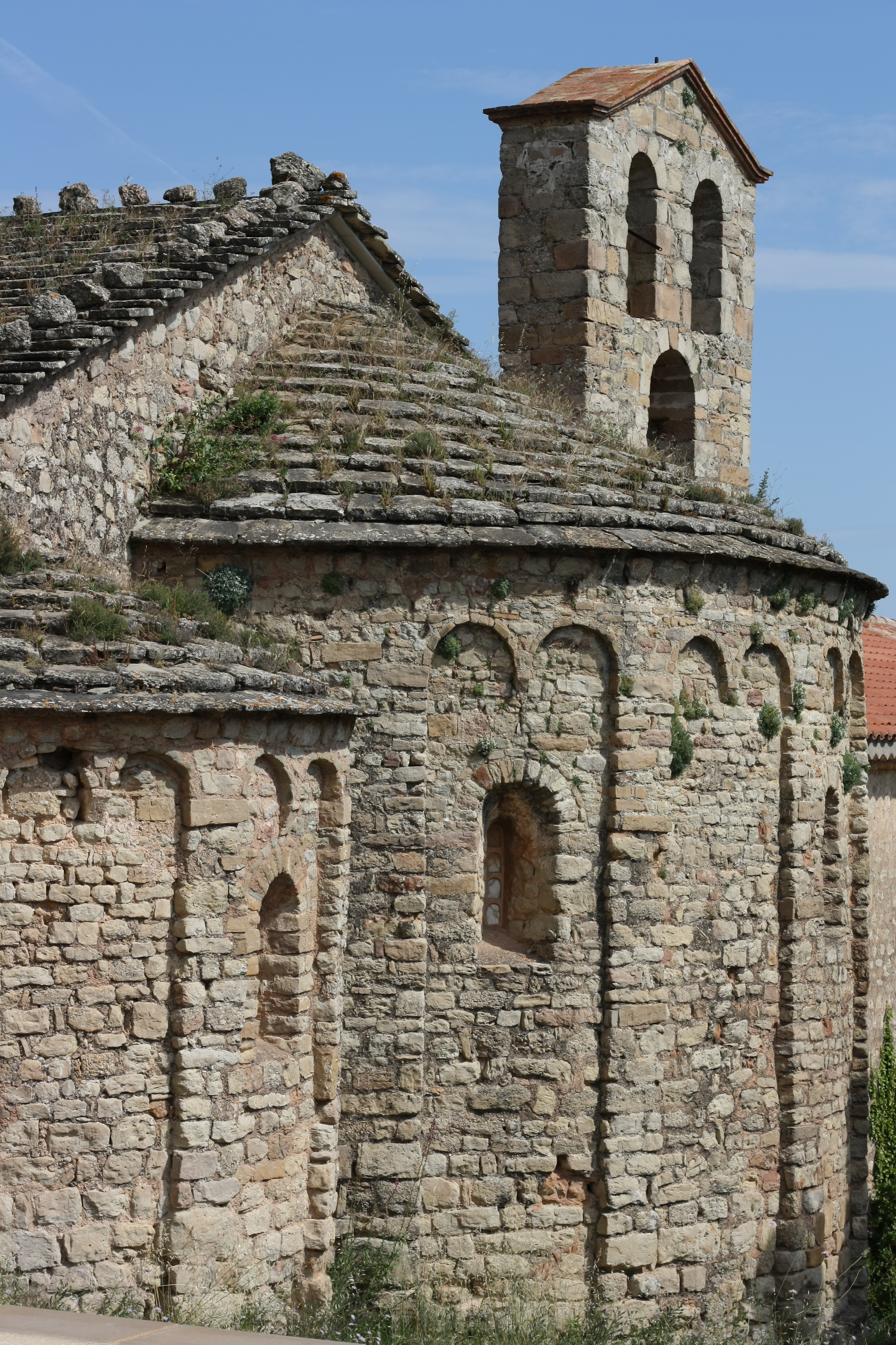 Kirche Santa Cecilia auf dem Montserrat (Berg), Apsiden und Glockenturm